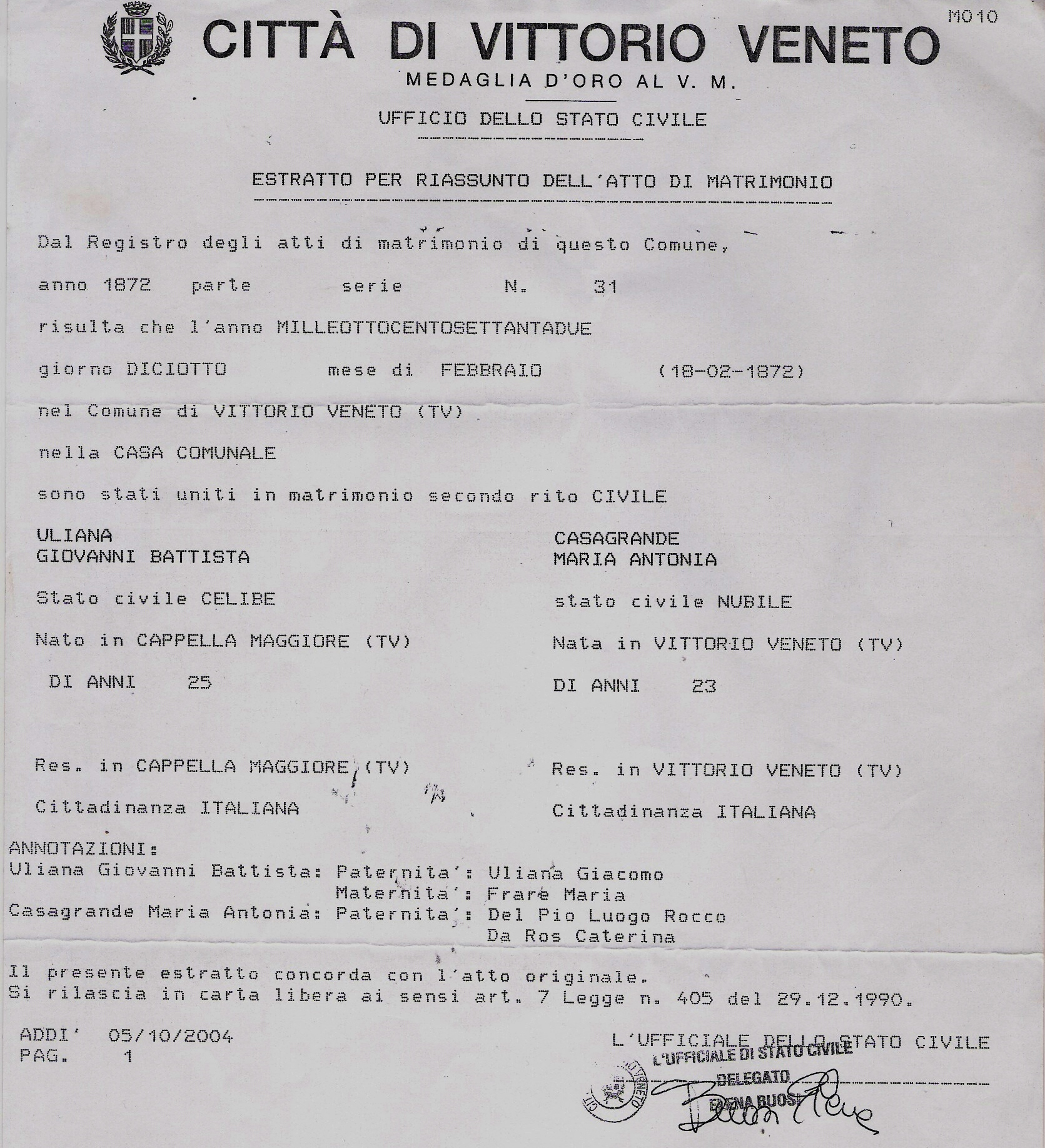 Certidão de casamento de Giovanni Battista Uliana e Maria Antonia Casagrande. Acervo de Clara Uliano Della Giustinna